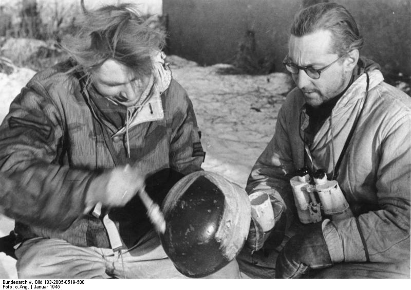 Westfront, 18.1.45 Fallschirmjäger an der Ardennenfront. Bei den harten Kämpfen im Frontbogen im Westen sind auch Fallschirmjäger eingesetzt. In den Ardennen liegt Schnee, und alles wird weiss. Auch Stahlhelme, Ferngläser und Waffen.